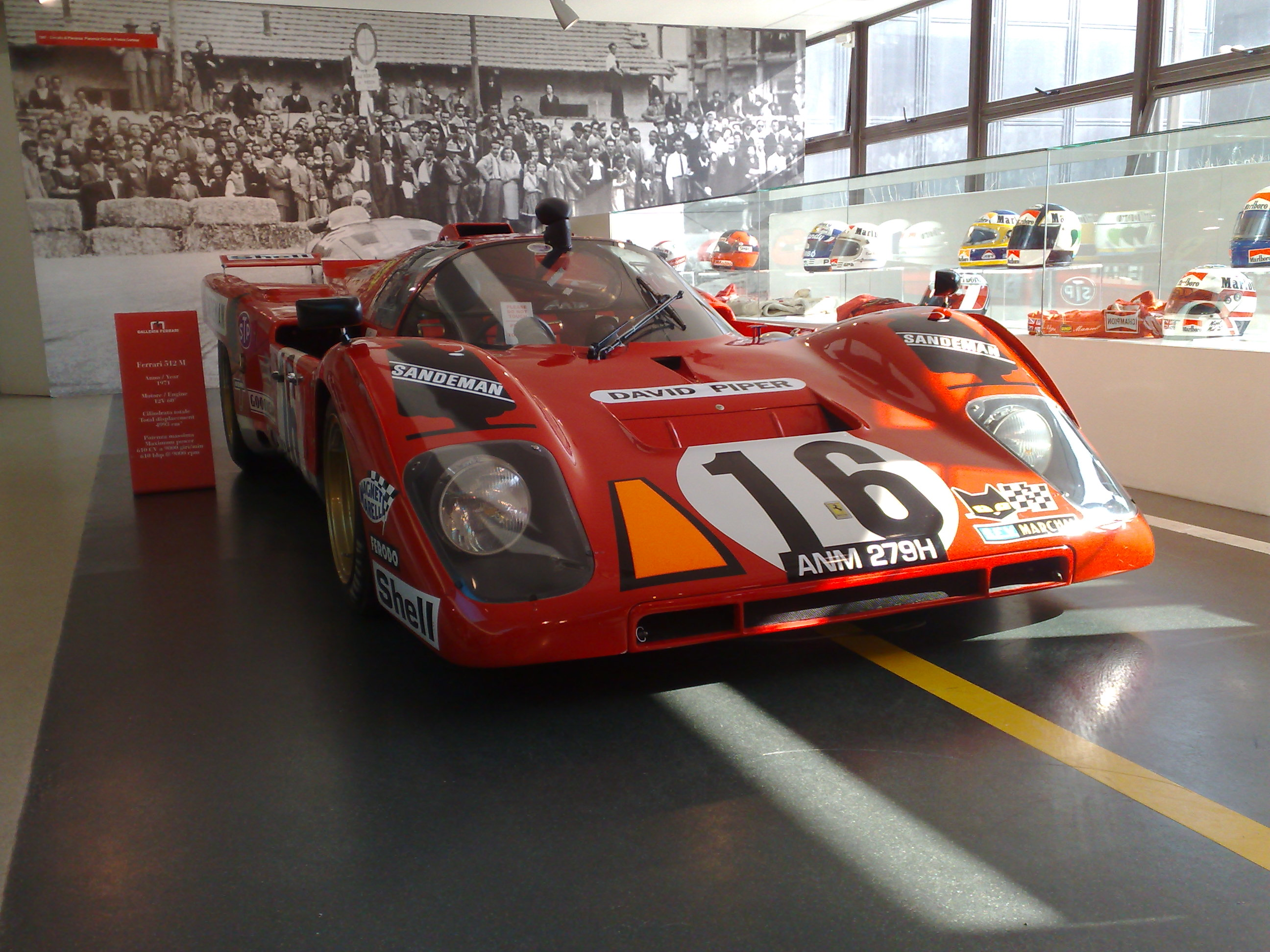 Ferrari 512M, Galleria Ferrari, Maranello